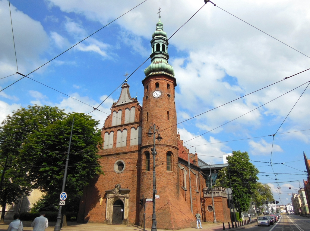 Kościół p.w. Wniebowzięcia Najświętszej Marii Panny w Bydgoszczy (zbud. 1582-1615, do 1835 r. kościół klasztorny klarysek bydgoskich)